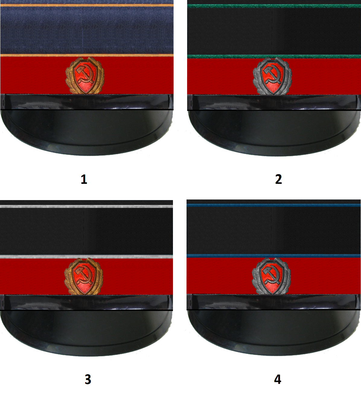 Фуражки милиции25